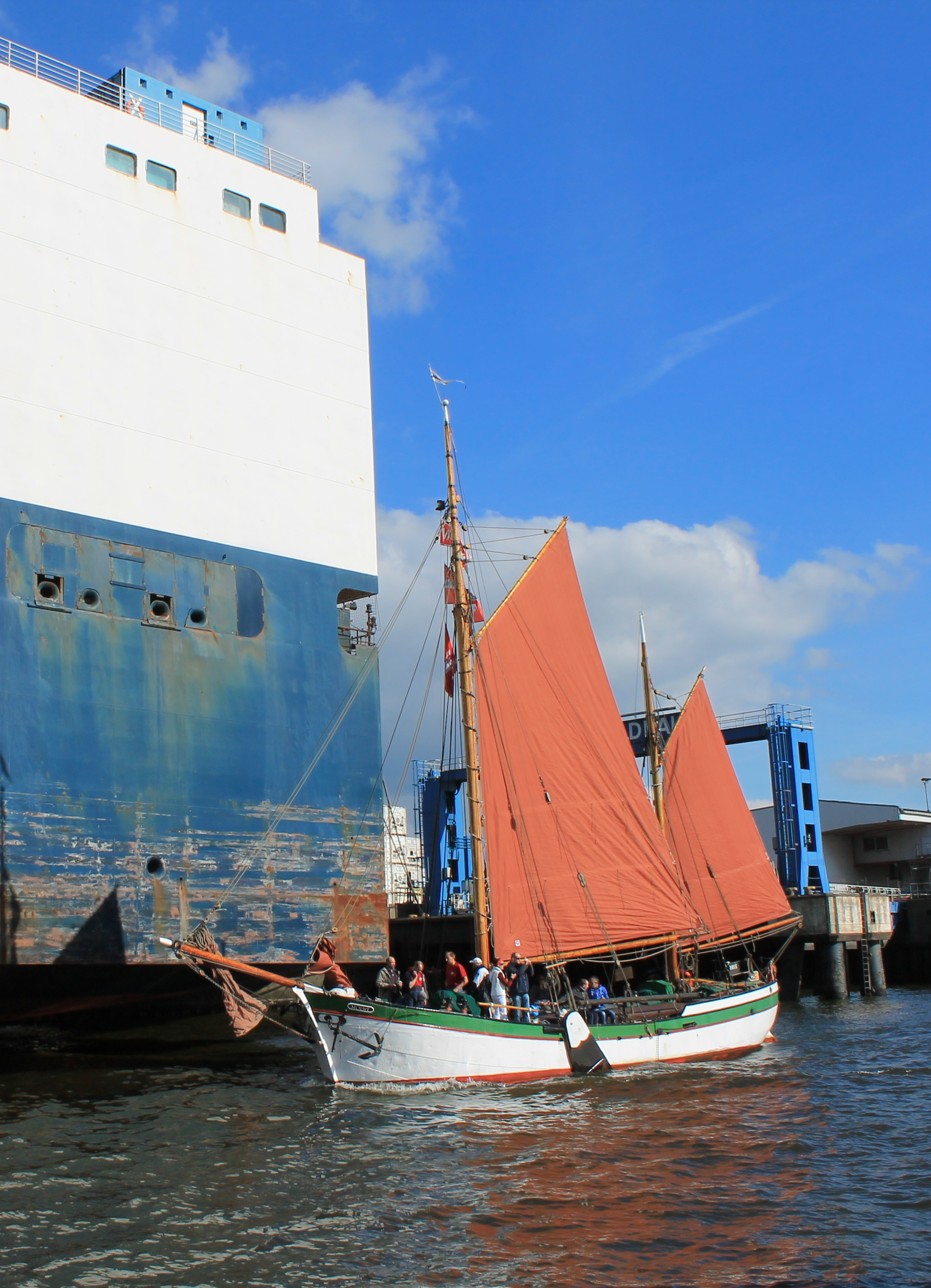 Der Besanewer Moewe im Hamburger Hafen